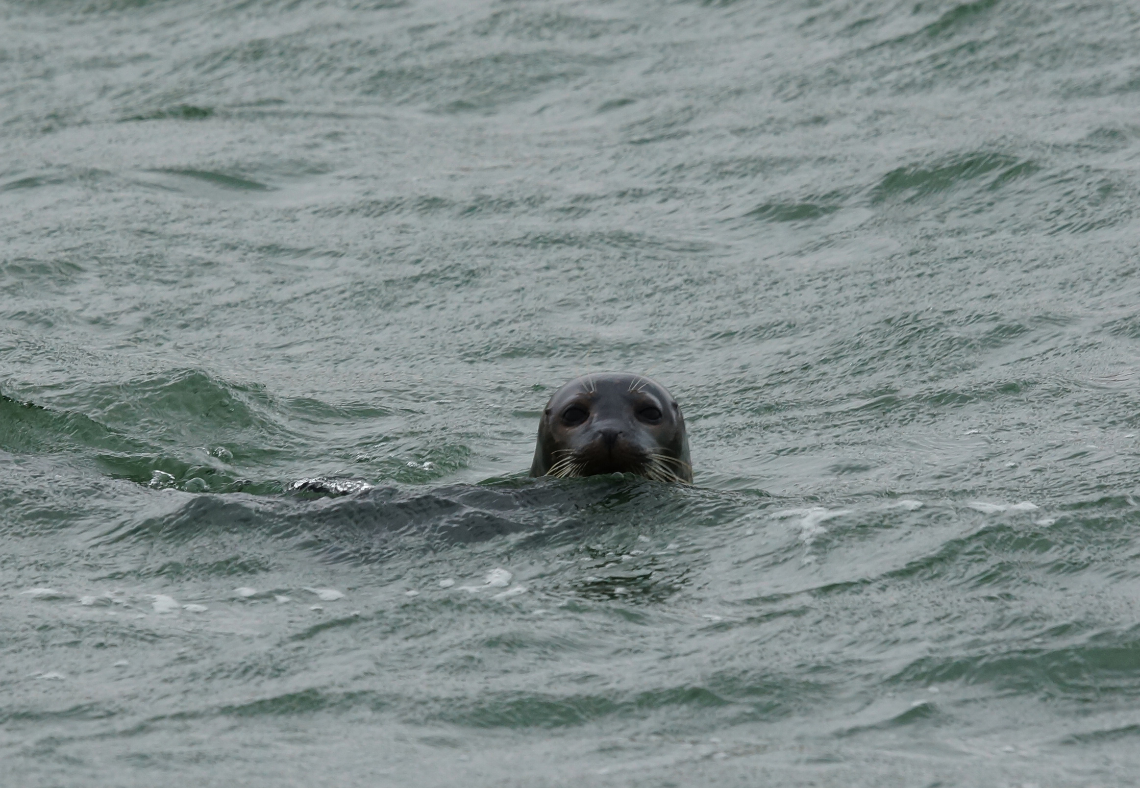 Nijlhaven Europoort